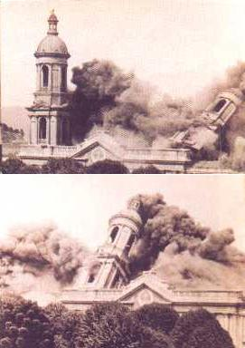 Imagen de la demolición la antigua catedral de Concepción, Chile.